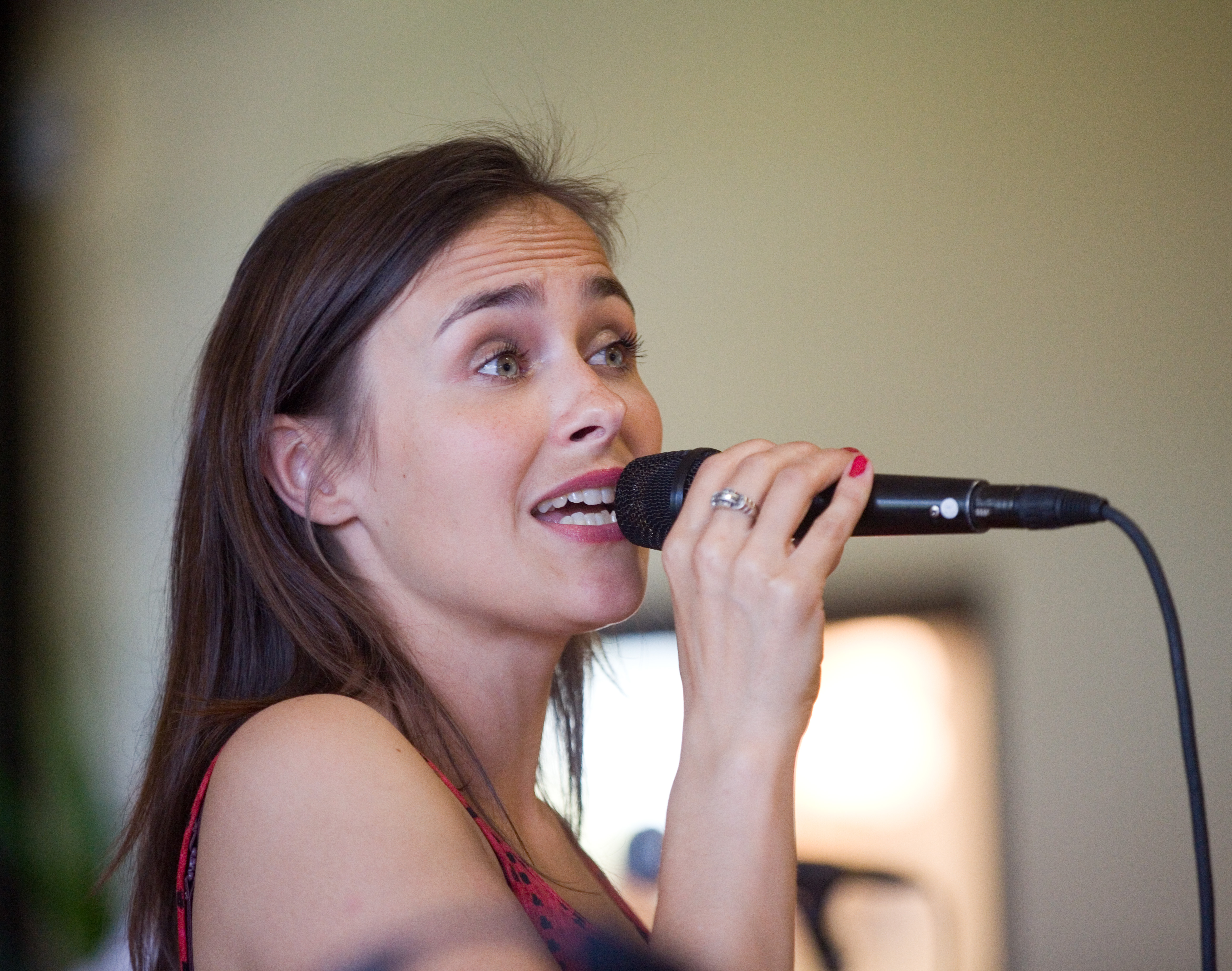 Anne Chris